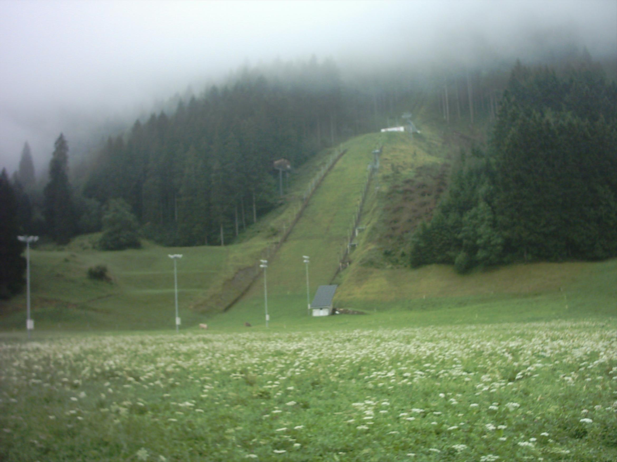 Schanze in Engelberg bei Nebel im Sommer.